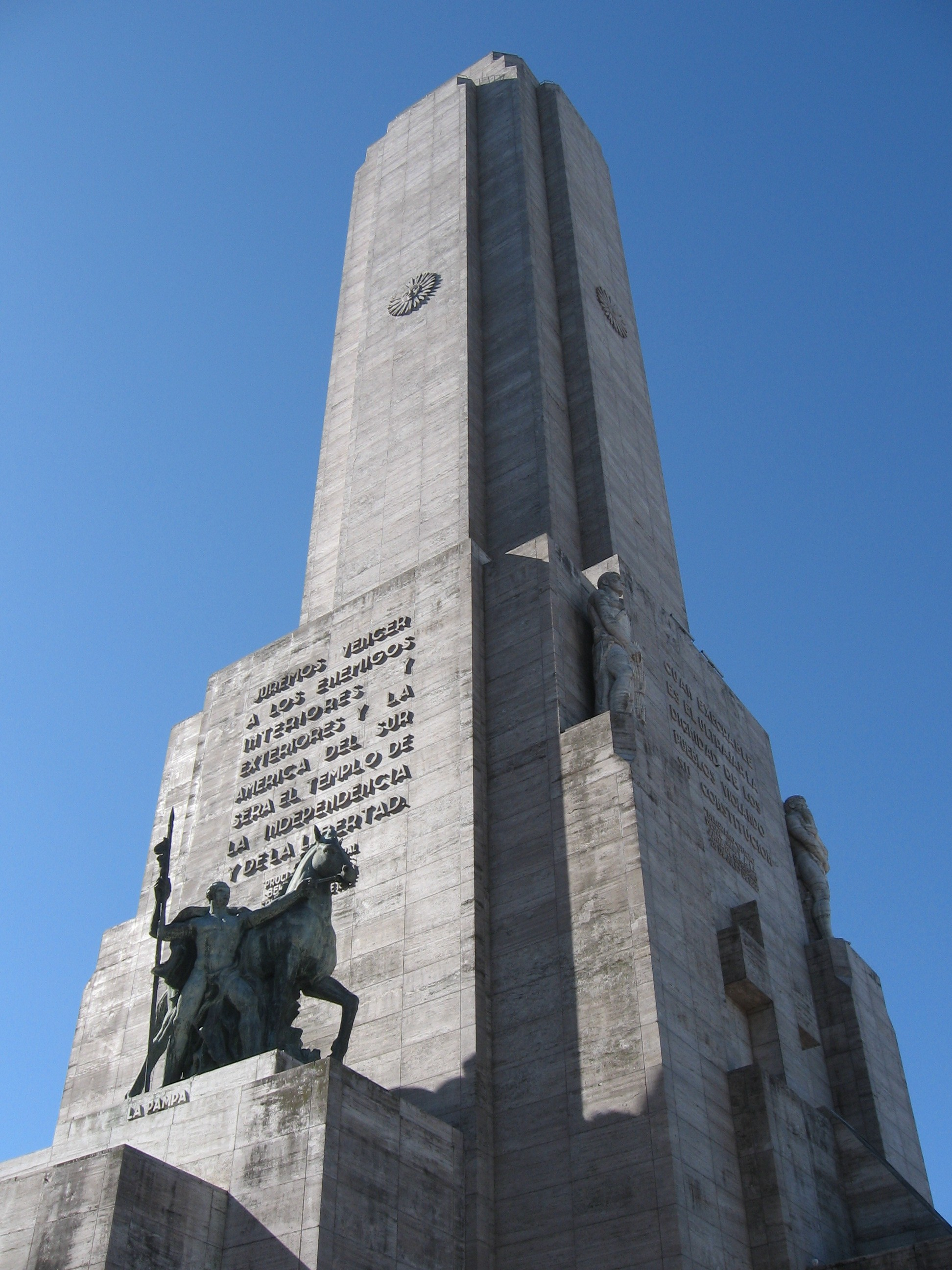 Monumento a la Bandera, en Rosario